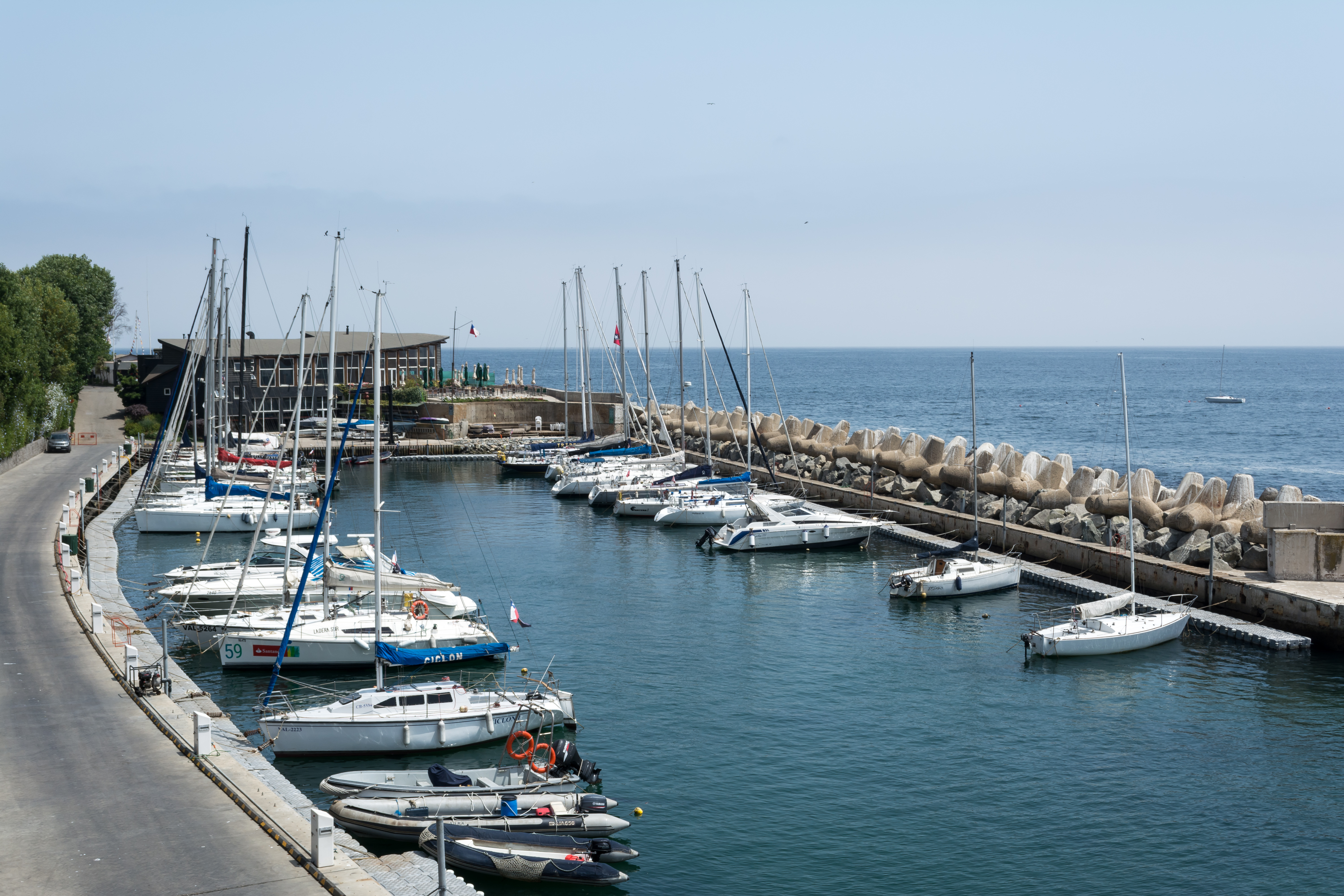 Yacht Club de Chile, Viña del Mar, Región de Valparaíso, Chile